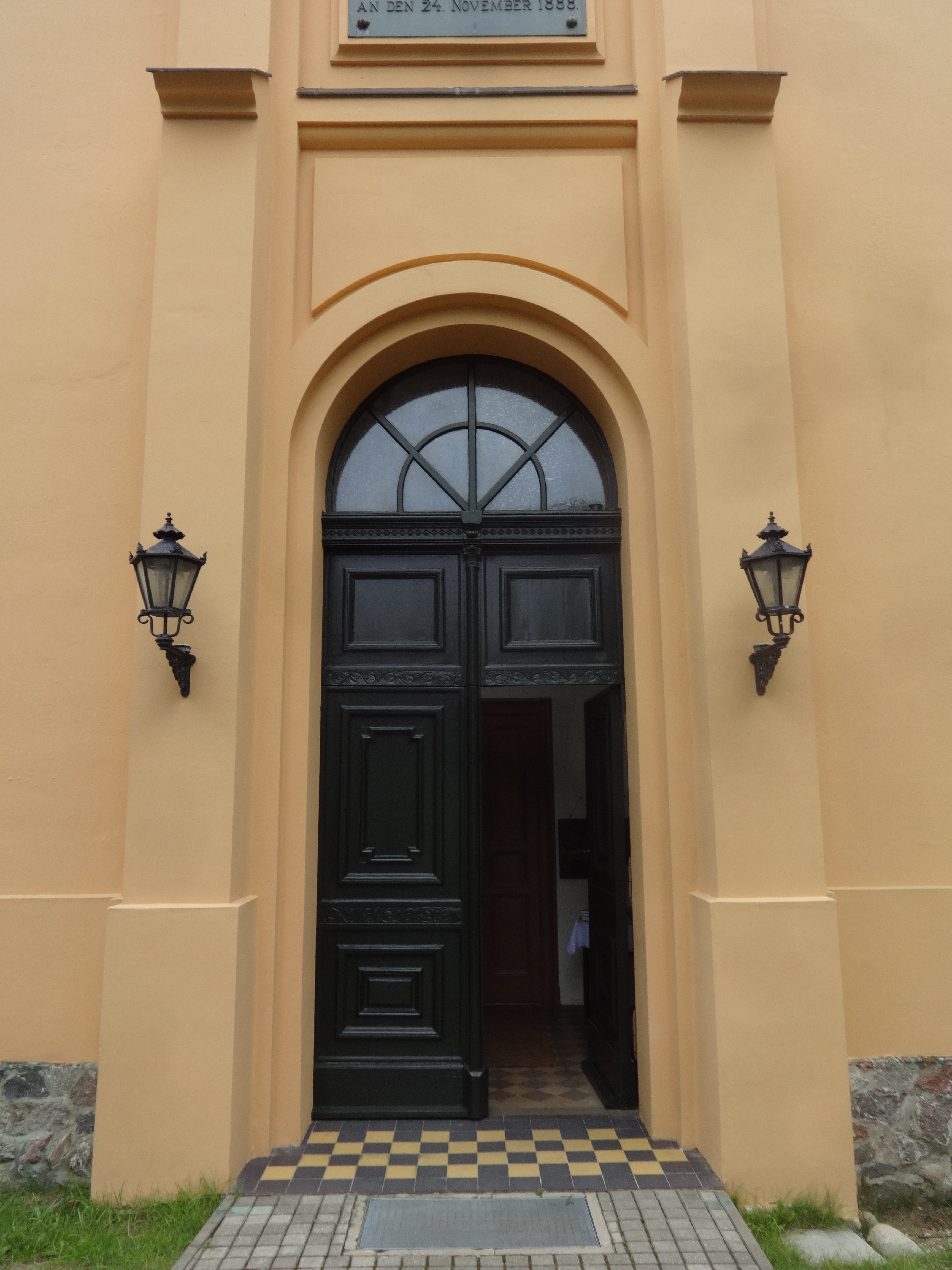 Die Dorfkirche in Rangsdorf ist eine Saalkirche mit einem polygonalen Chor, die in den Jahren 1888 bis 1890 errichtet wurde. Im Innenraum steht unter anderem ein Kanzelaltar aus dem Jahr 1717 eines Vorgängerbaus.